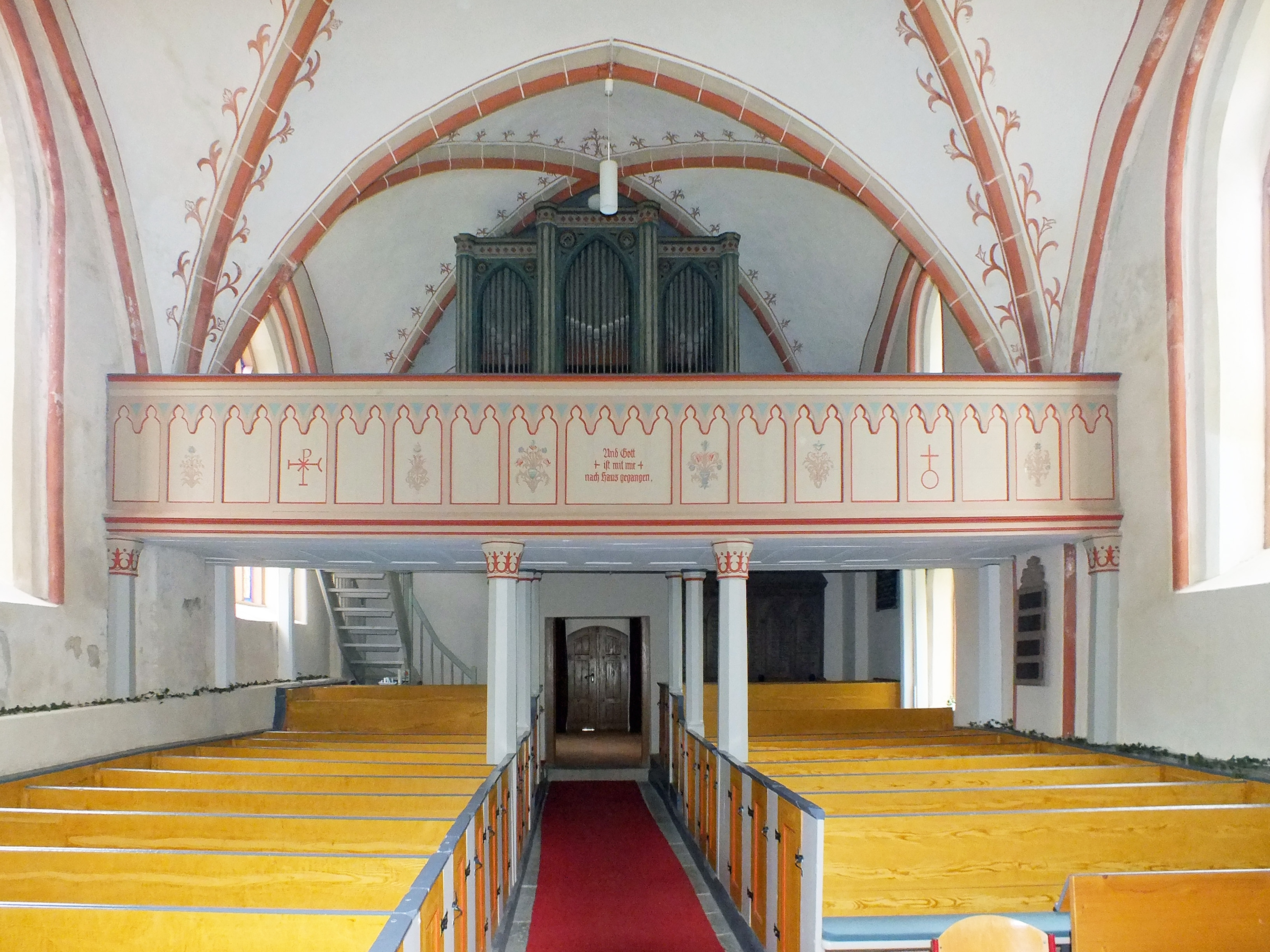 Die Orgelempore in der Kirche von Hanshagen